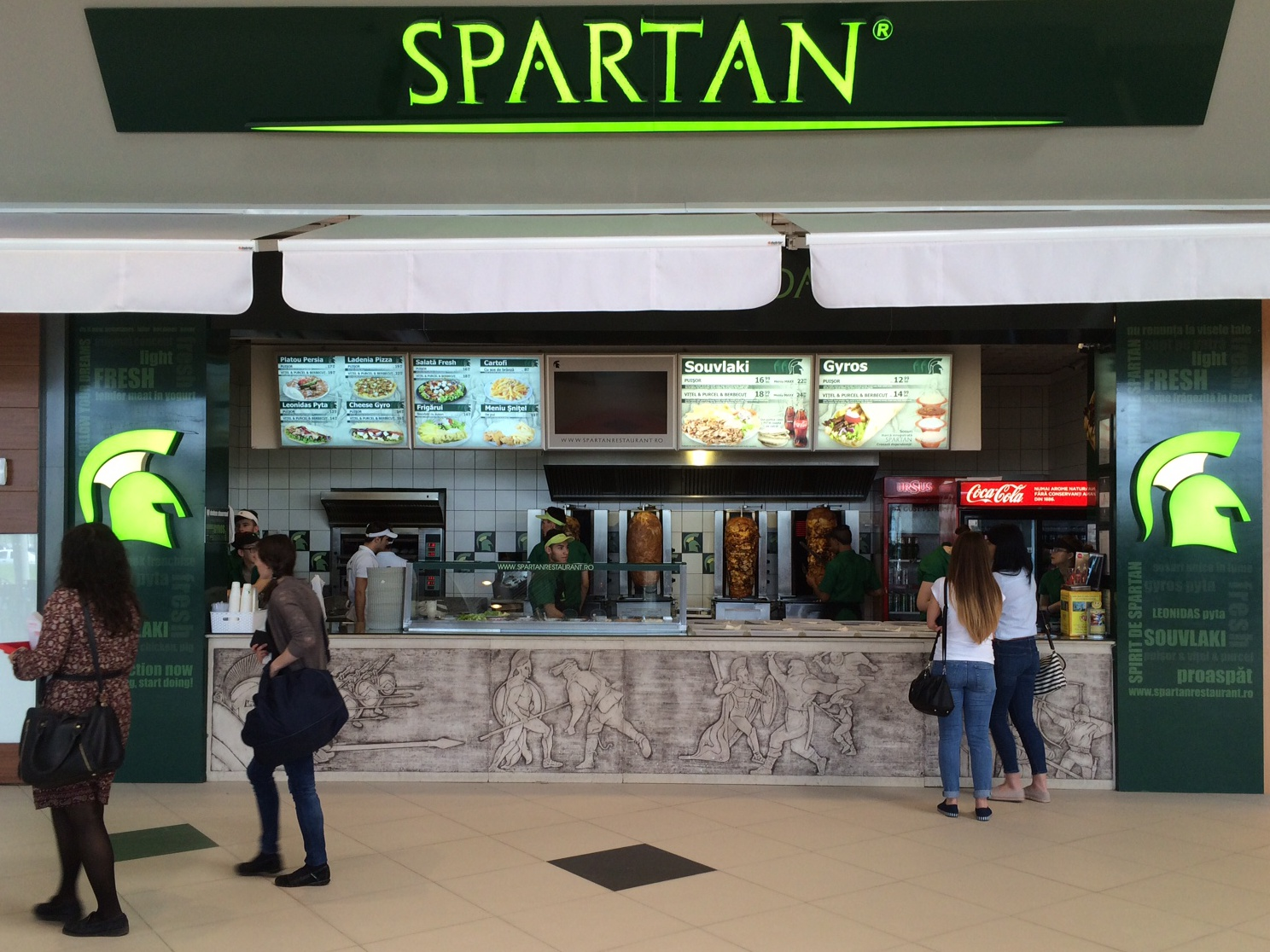 Spartan Restaurant in Coresi Shopping Resort, Brasov